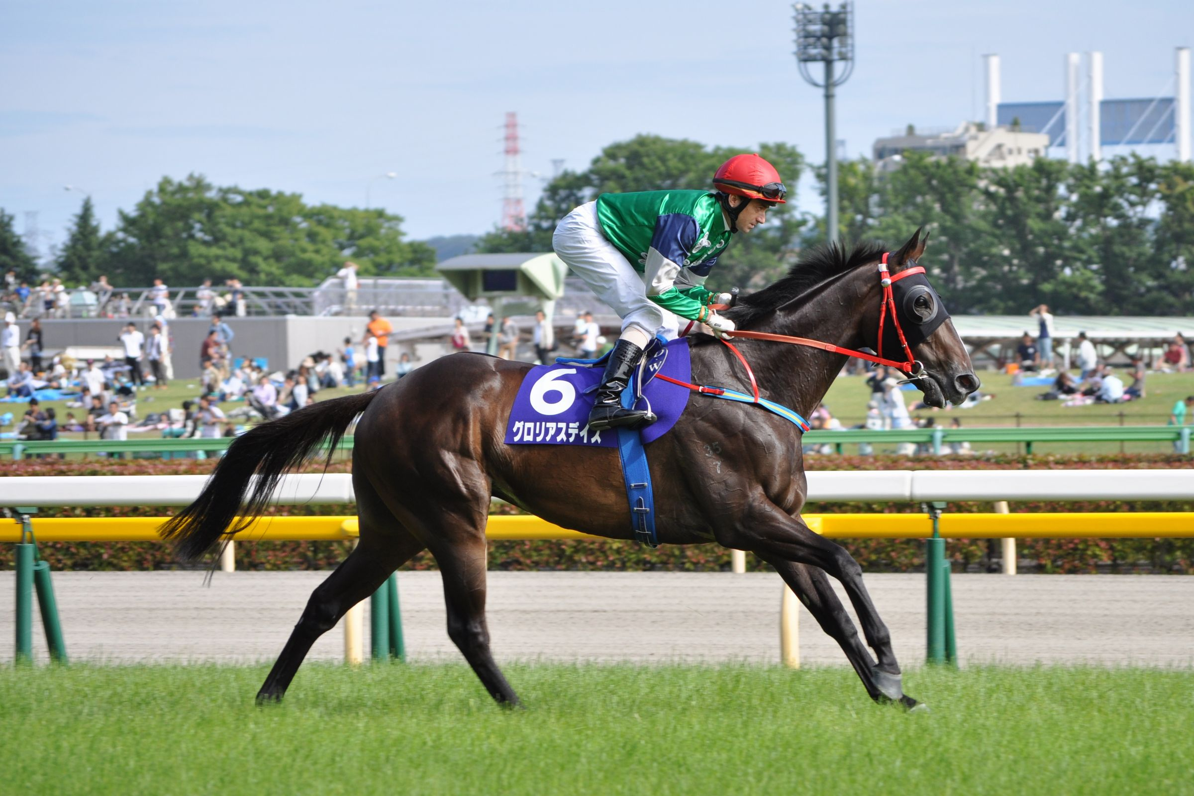 2013年安田記念に出走した香港調教馬グロリアスデイズ。 2013-06-02 東京競馬場